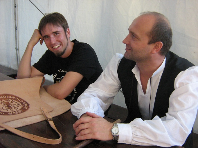 Jan Szała (l), Dominik Szczodry, Główny Piwowar Brackiego Browaru Zamkowego w Cieszynie